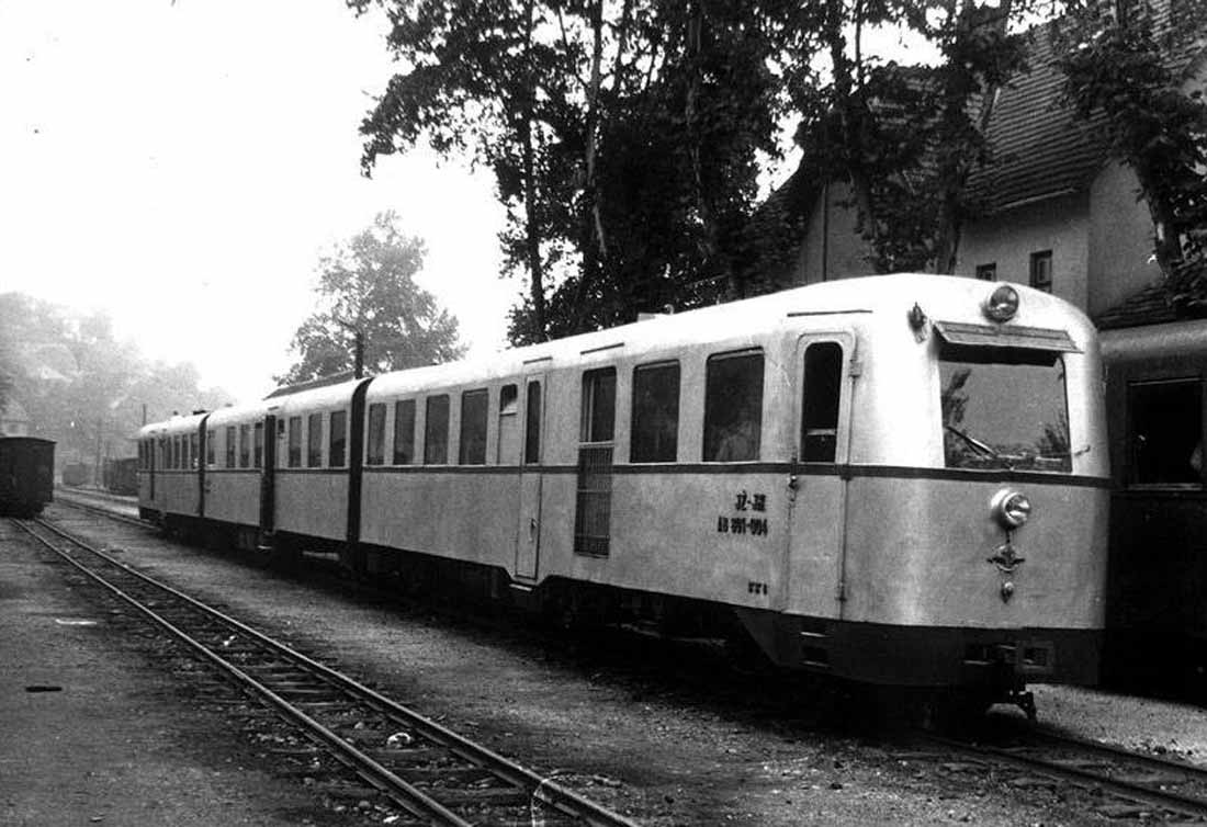 Schmalspurtriebzüge JŽ-Reihe 801 in Ustiprača